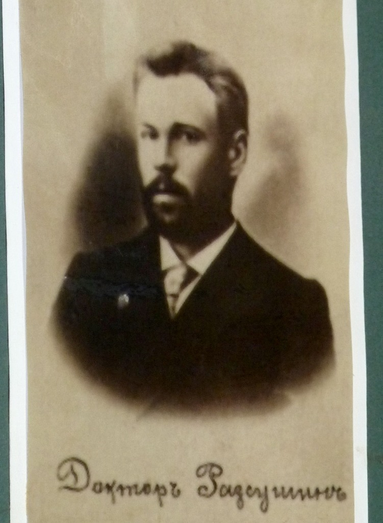 Аркадий Александрович Рассушин доктор